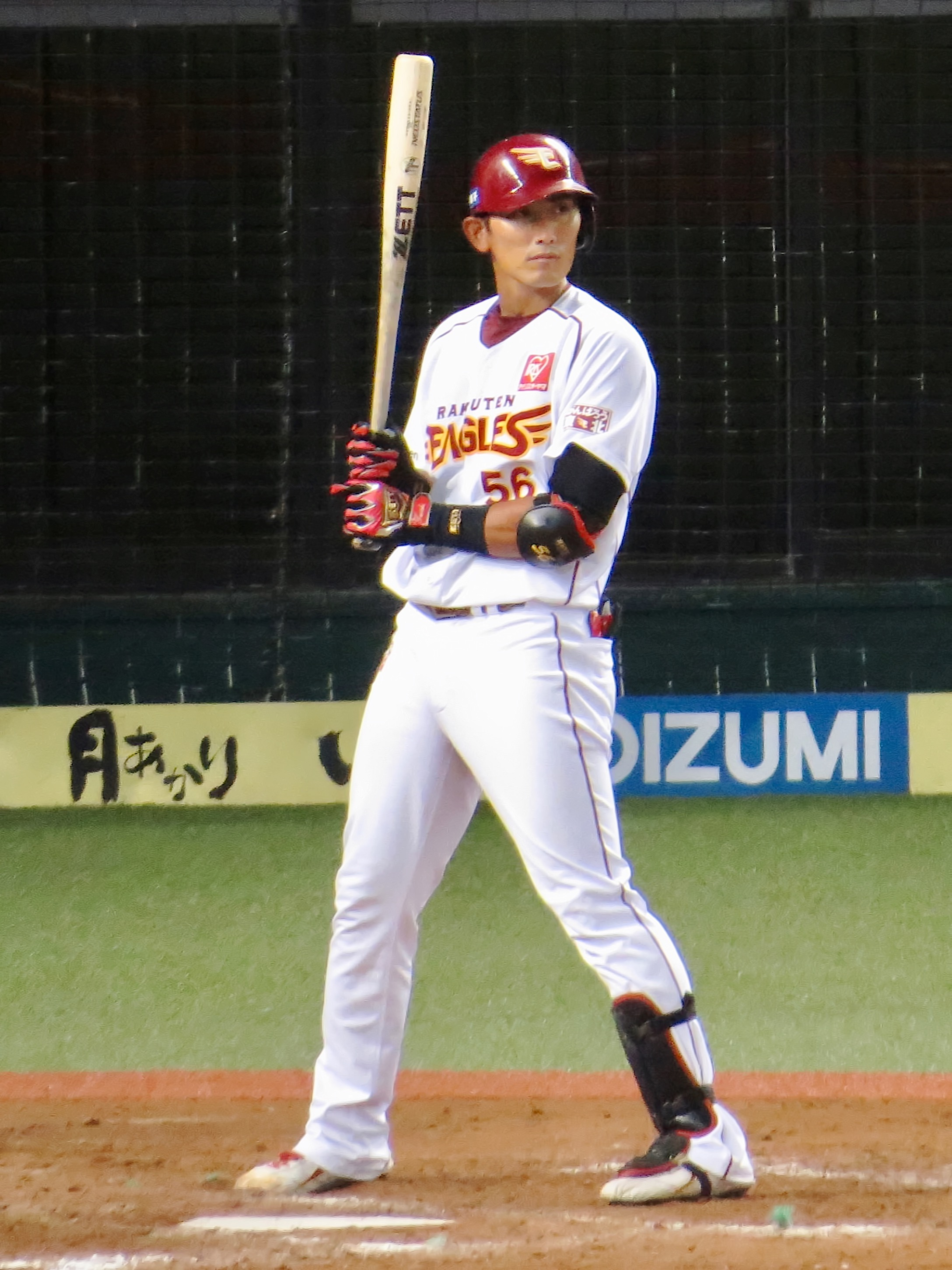 メットライフドームにて